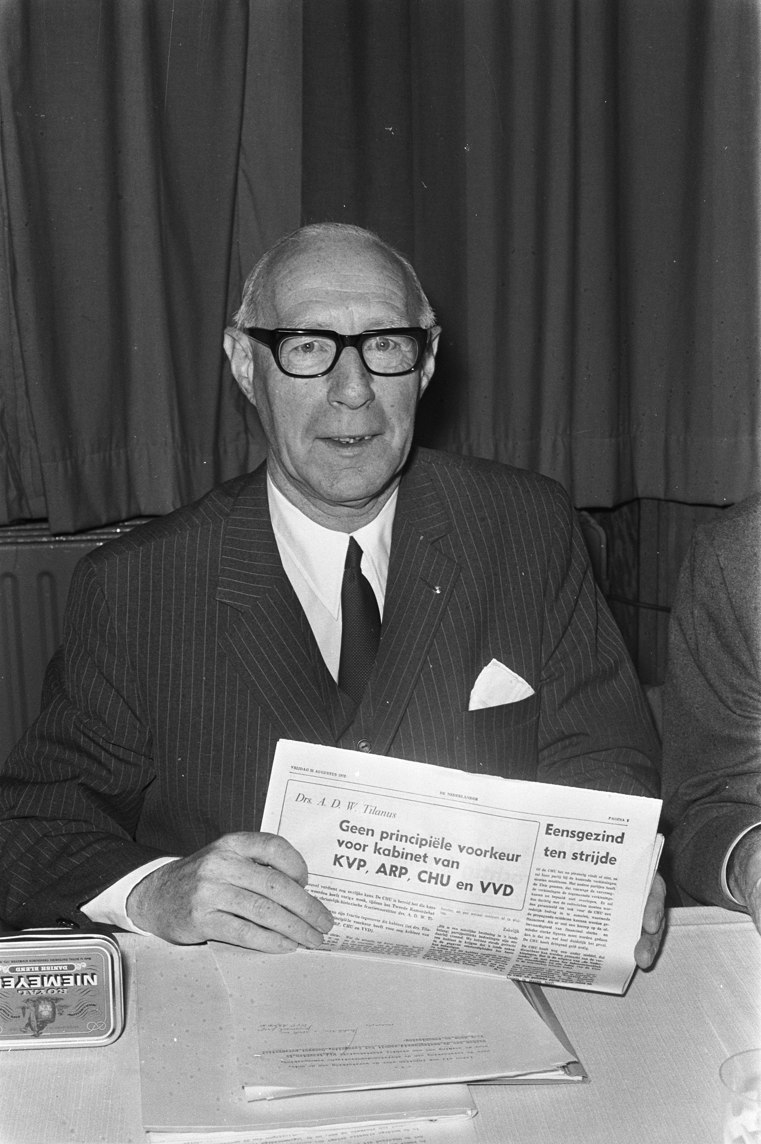 Collectie / Archief : Fotocollectie Anefo Reportage / Serie : [ onbekend ] Beschrijving : Unieraad van de CHU bijeen in Utrecht om een lijsttrekker te kiezen; Arnold Tilanus wordt als lijsttrekker gekozen Datum : 9 september 1972 Locatie : Utrecht (prov), Utrecht (stad) Trefwoorden : conferenties, lijsttrekkers, politiek, verkiezingen Persoonsnaam : Tilanus, A.D.W. Instellingsnaam : CHU Fotograaf : Peters, Hans / Anefo Auteursrechthebbende : Nationaal Archief Materiaalsoort : Negatief (zwart/wit) Nummer archiefinventaris : bekijk toegang 2.24.01.05 Bestanddeelnummer : 925-8645